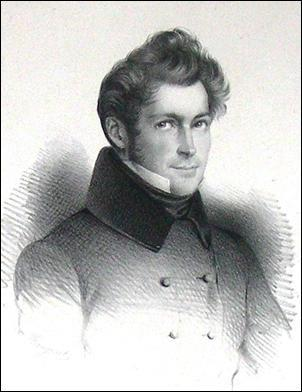 Henri de Brouckère, Premier ministre belge